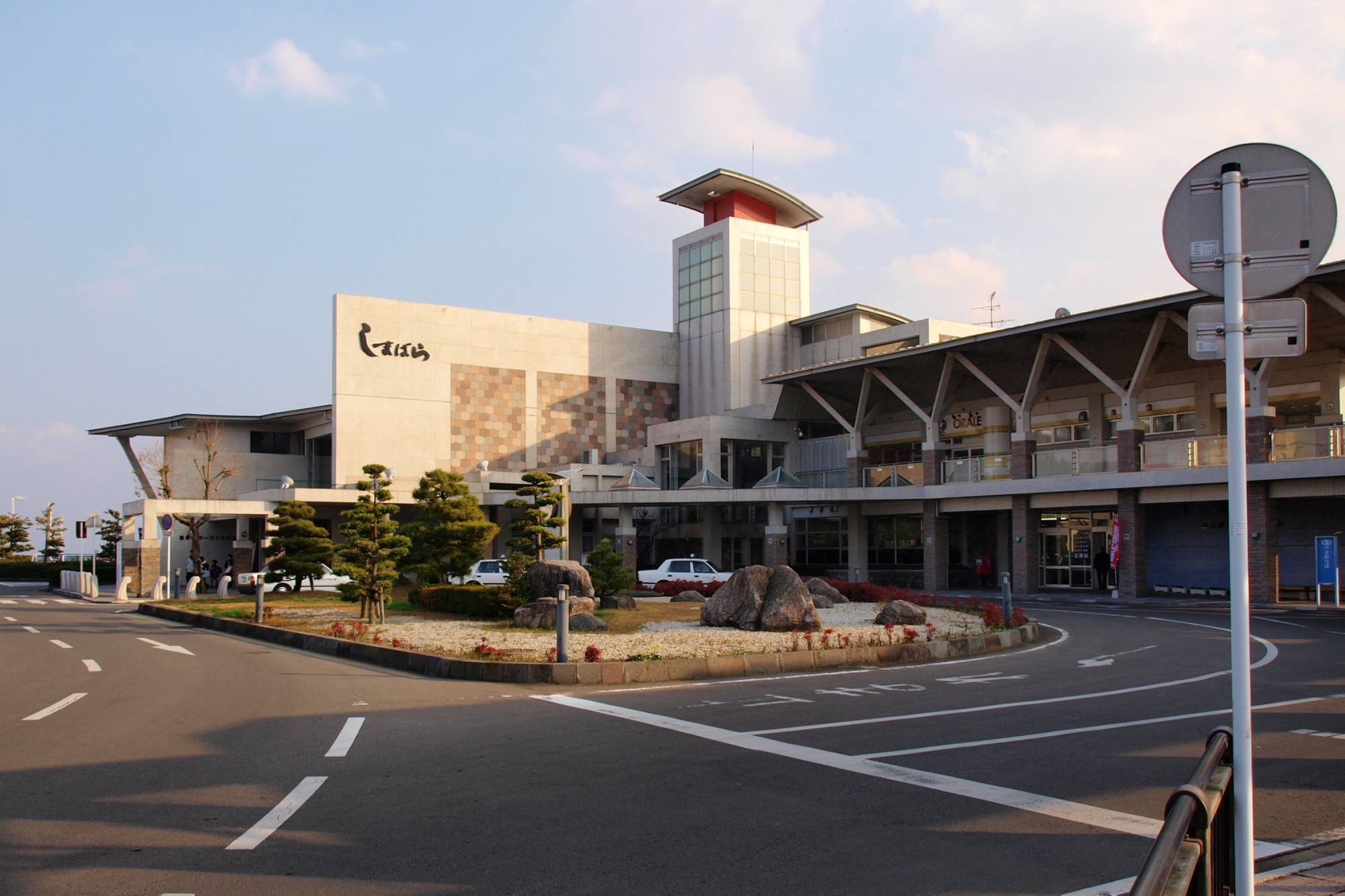 島原港のターミナルビル 2008年12月撮影